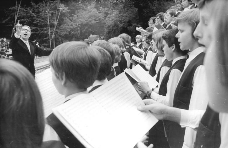 Erfurt, 15. Arbeiterfestspiele, Konzert ADN-ZB Katscherowski 8.6.74 Erfurt: 15. Arbeiterfestspiele - Der Leipziger Thomanerchor unter der Leitung von Thomaskantor Prof. Hans-Joachim Rotzsch gab am 8.6.74 auf der Freilichtbühne im Erfurter Steingarten ein festliches Konzert.